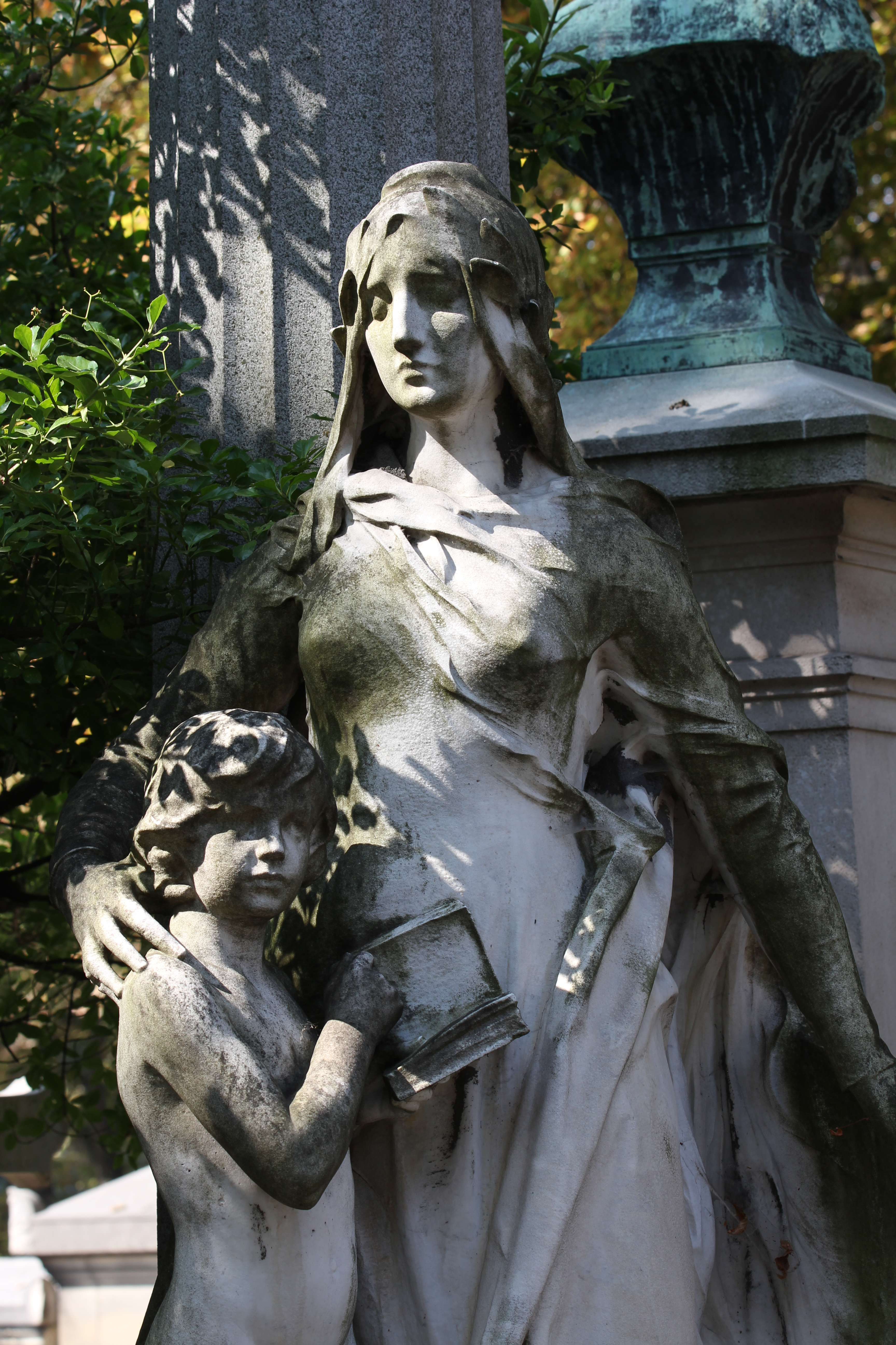 Sépulture d'Eugène Spuller (1835-1896), député, sénateur et ministre. Fidèle de Gambetta, il accompagne celui-ci lors de son échappée en ballon monté vers Tours. Monument composé d'une haute colonne surmontée d'un buste d'homme et d'une statue de jeune homme nu tenant un cahier dans les mains, allégorie de la République, instruisant la Démocratie représentée en jeune femme drapée.